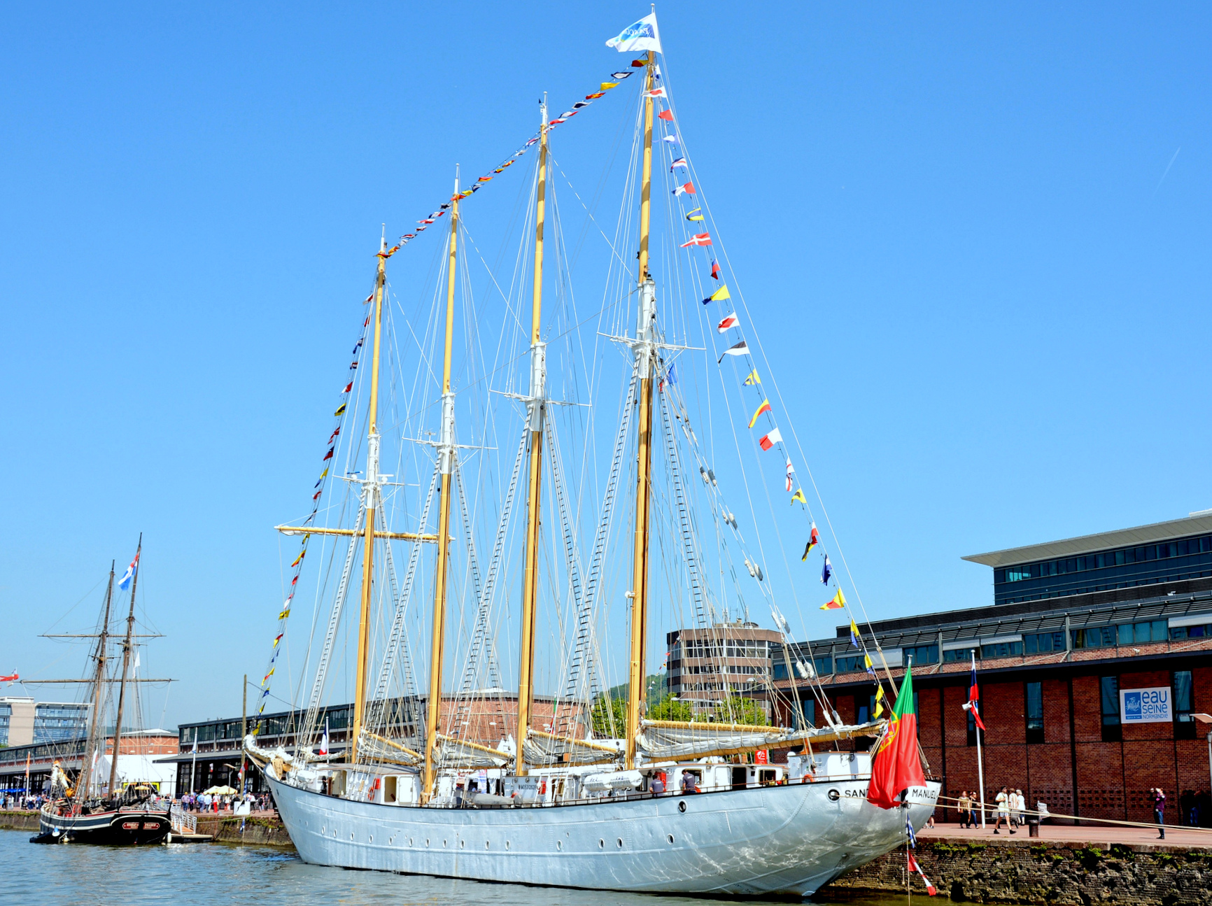 Le Santa Maria Manuella (Armada Rouen)